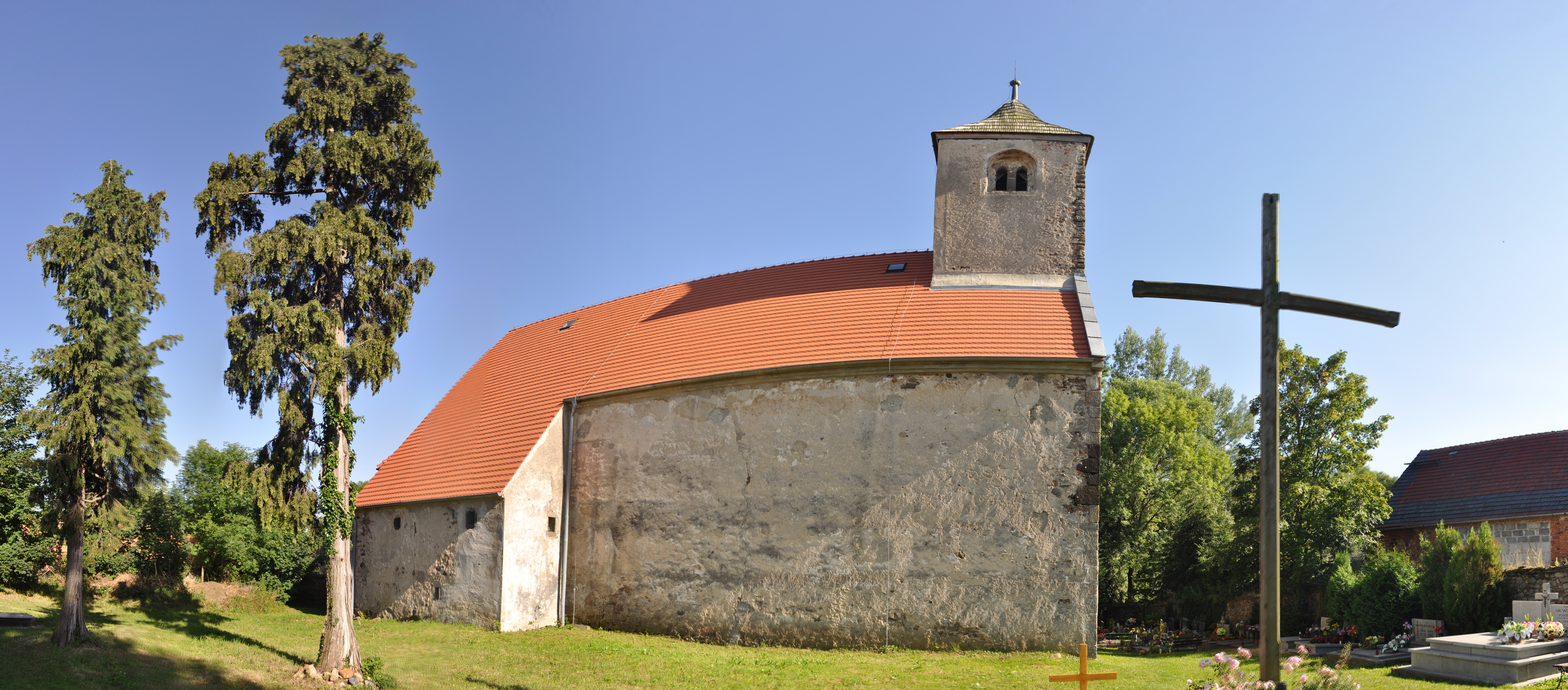 Kościół Podwyższenia Krzyża Świętego w miejscowości Pogwizdów